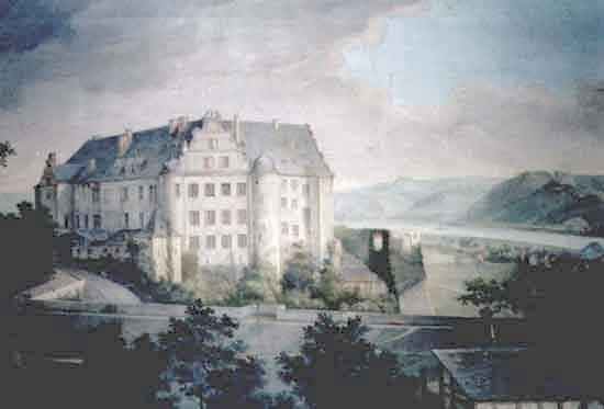 Schloss Arenfels, altes Gemälde